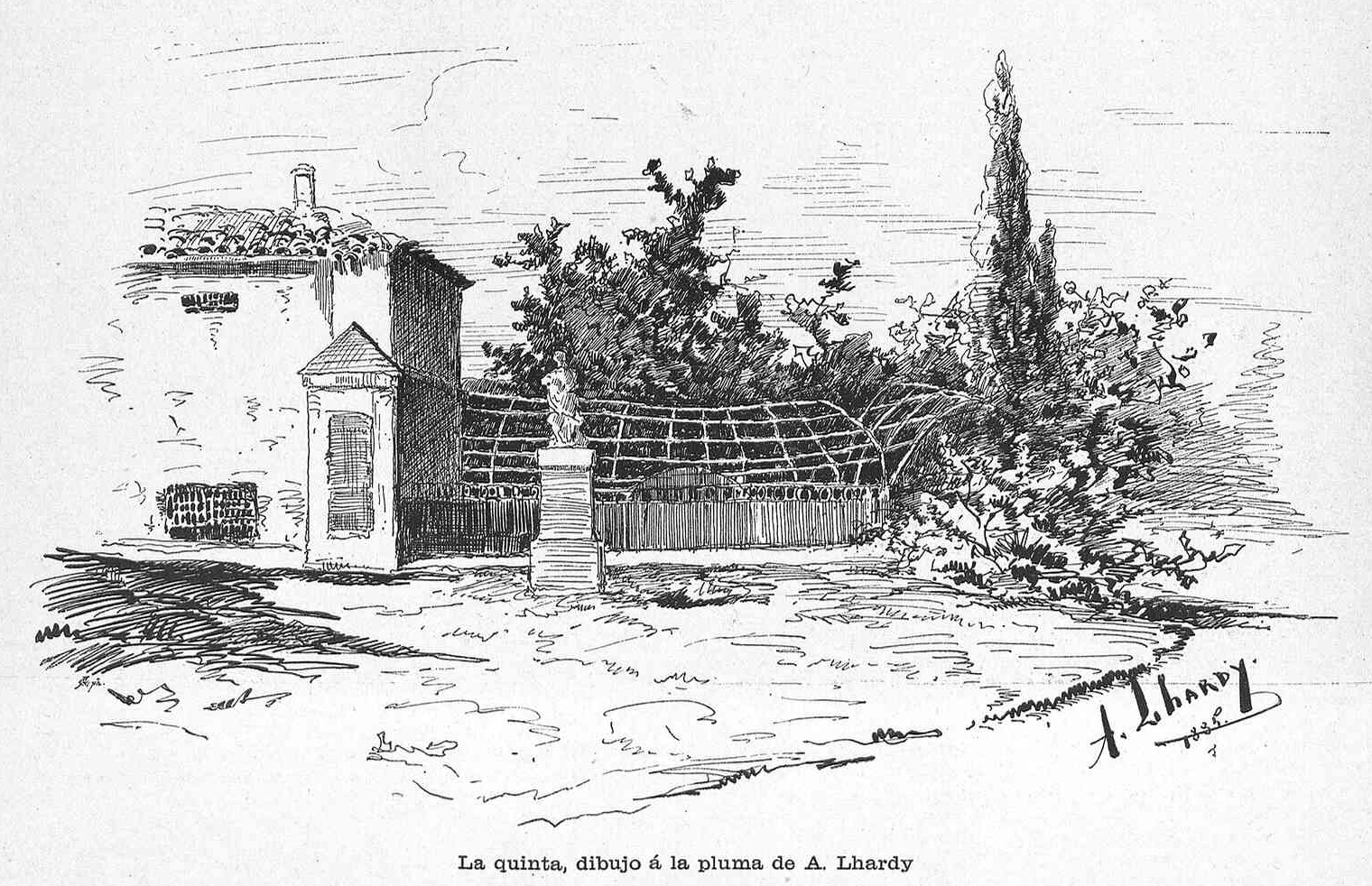 La quinta.